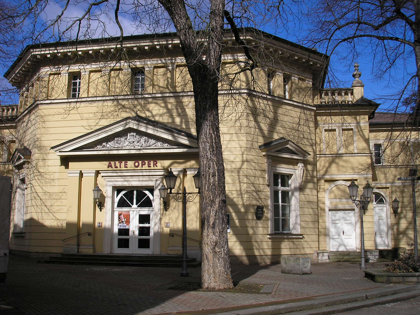 Die Alte Oper in Erfurt (Thüringen).